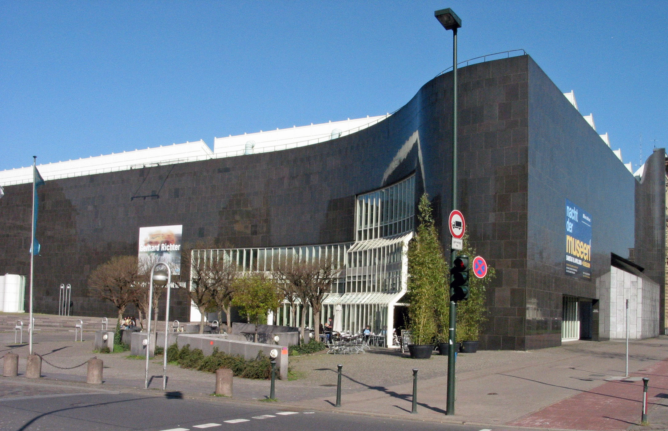 K20 in Düsseldorf, Museum für Kunst des 20. Jahrhunderts